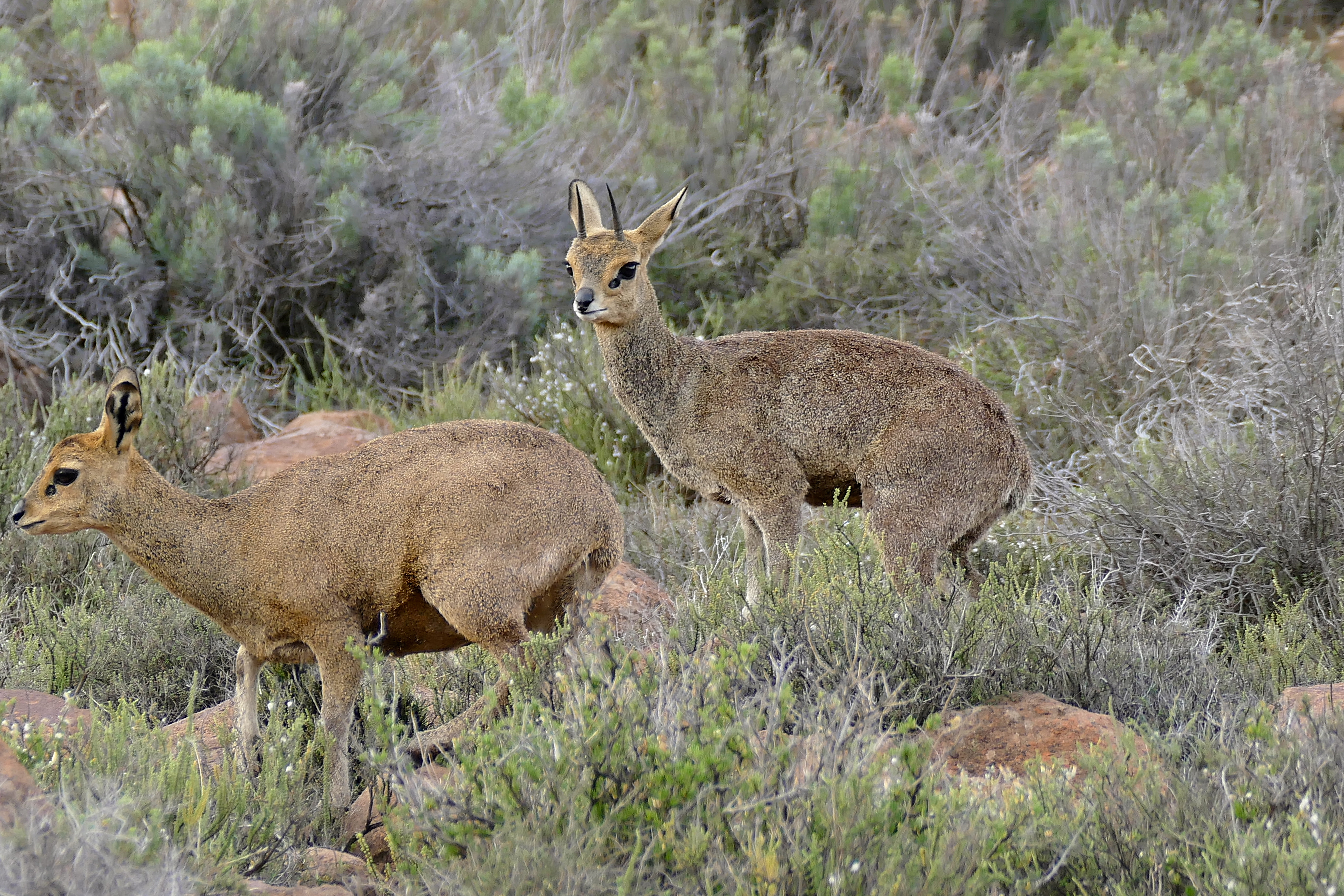 Klipspringer Pass, Potlekkertjie Loop, Karoo NP, Western Cape, SOUTH AFRICA